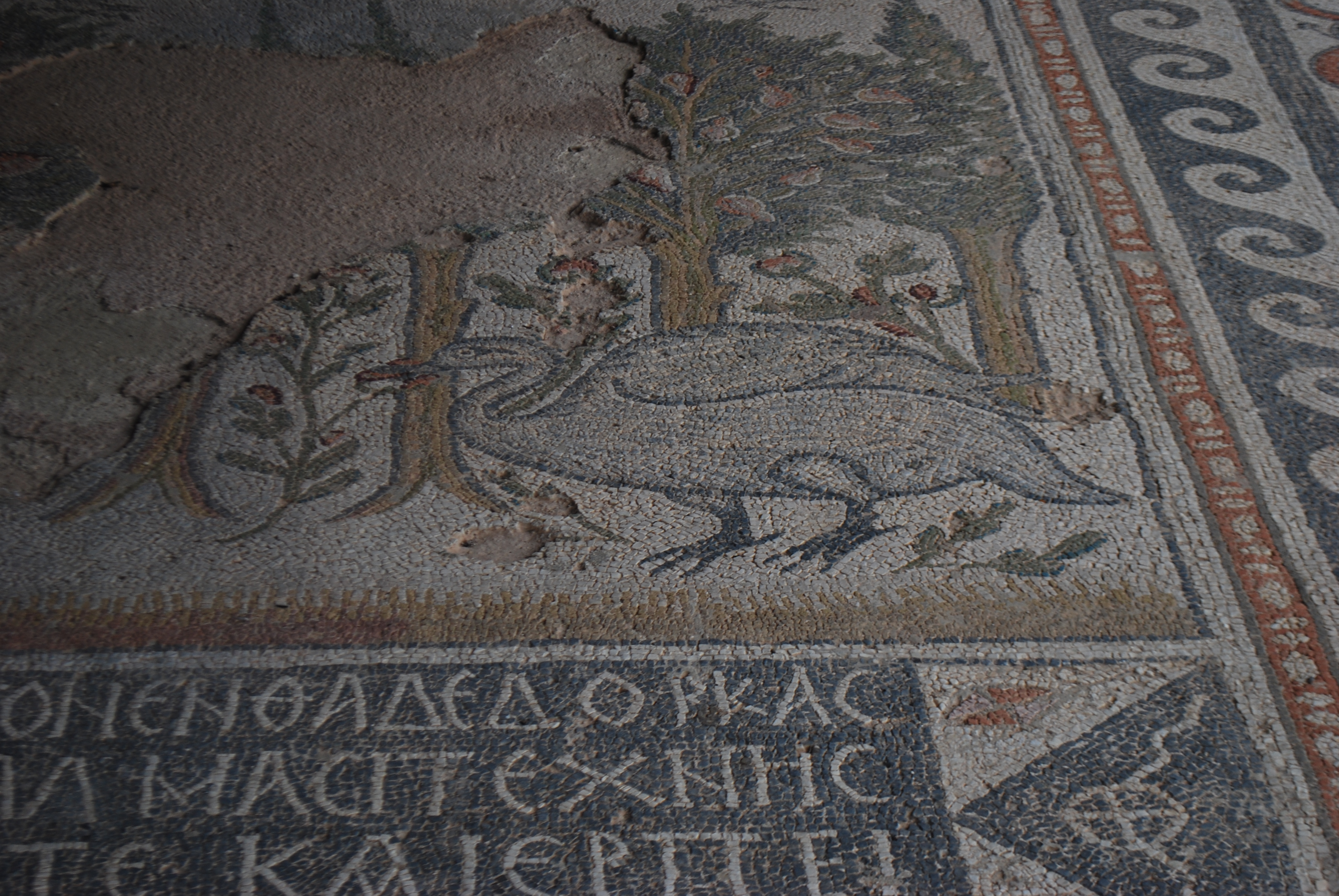 Vue de Nicopolis en Epire.